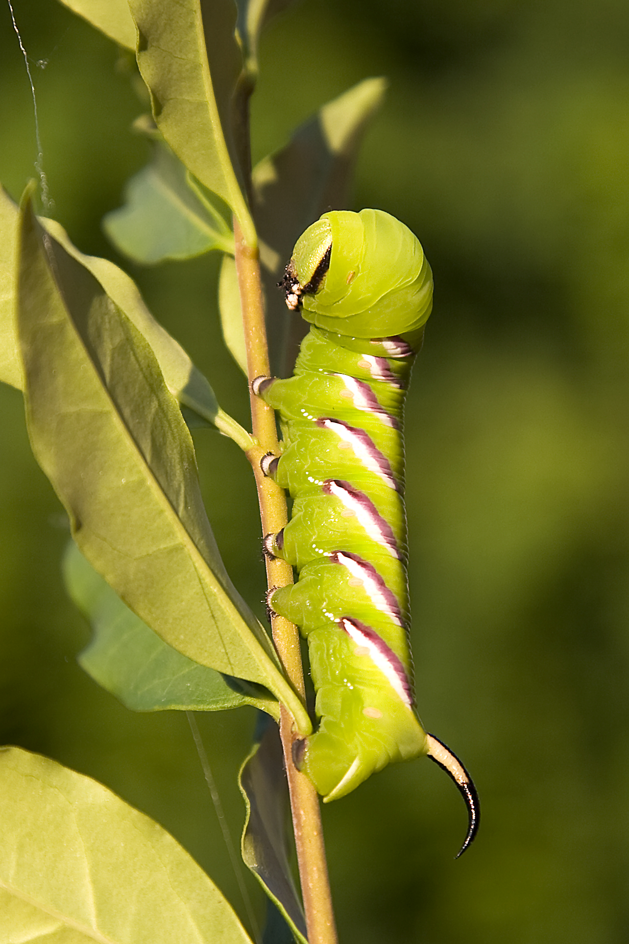 einige Tage vor der Verpuppung - aufgenommen in 33428 Harsewinkel (Germany)